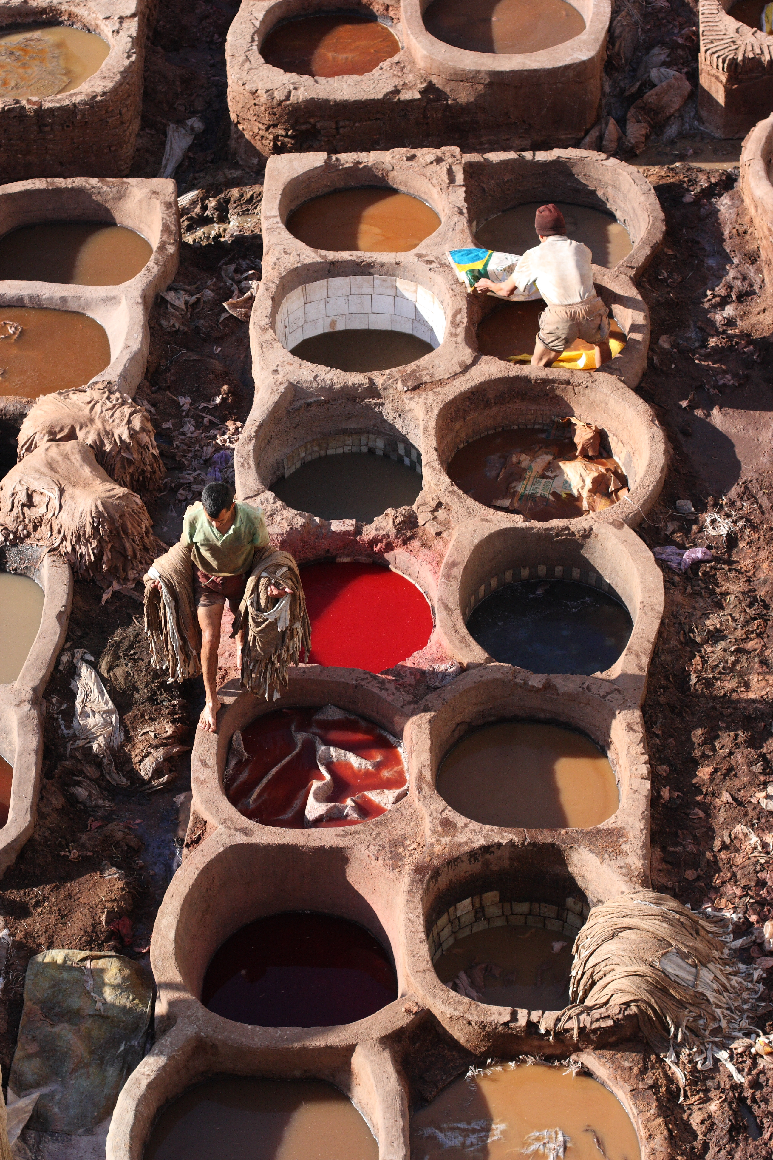 Fez Medina, Morocco